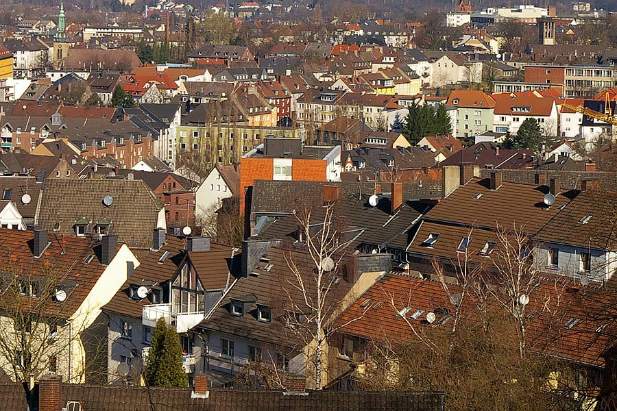 Witten, Blick über den statistischen Stadtbezirk Oberdorf-Helenenberg – Ein Dächermeer: Der statistische Bezirk von Witten-Mitte, Oberdorf-Helenenberg. Von einer Anhöhe nahe dem Helenenberg aus fotografiert.